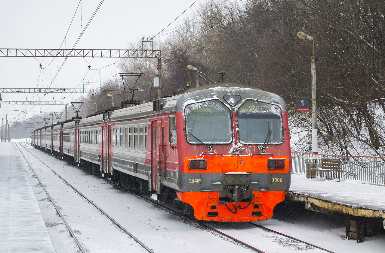 Построен в 8-вагонной составности Эксплуатация: C завода поступил в депо Безымянка 09.2015 — передан в ТЧ-31 Домодедово Мcк с секцией 027903-027904 04.2016 — передан в ТЧ-20 Апрелевка Мск 11.2016—01.2017 — аренда в ТЧ-10 Москва-2 Mcк 01.2017 — возвращён в депо Домодедово с вагоном ЭР2Т-718803 Вагоны и карты составности: 07.2012 — составность полная 08.2013 — составность: 030001-026502-030003-030004-030005-030010-030009; вагоны: (подмена) — 030002 06.2014—07.2015 — составность полная 07.2016 — дополнен секцией 027903-027904 Peмонт: ТР-2 ТЧ-7 Раменское Mcк 04.2017 г.